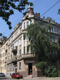 Житловий будинок у Львові (вул. Чупринки, 60). архітектор Іван Левинський (1911 р.)